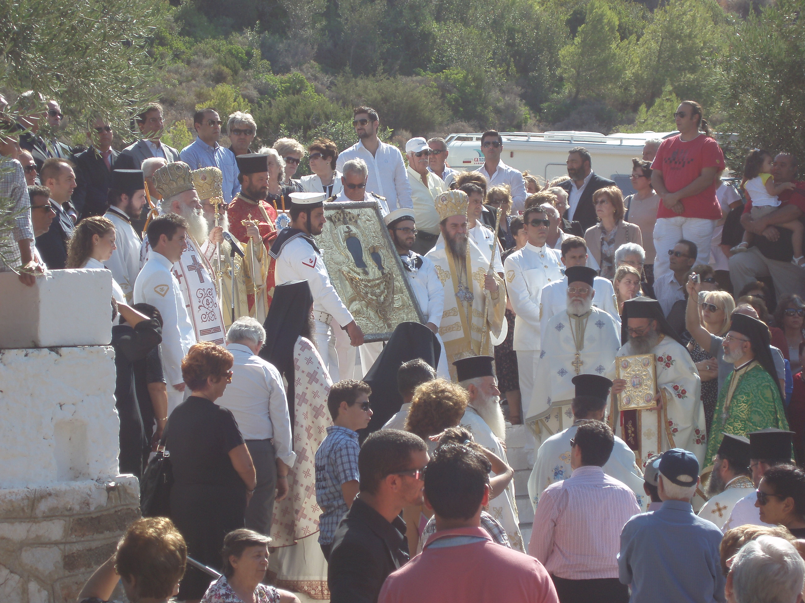 Ikone der Panagia Myrtidiotissa beim Inselfest Kythiras